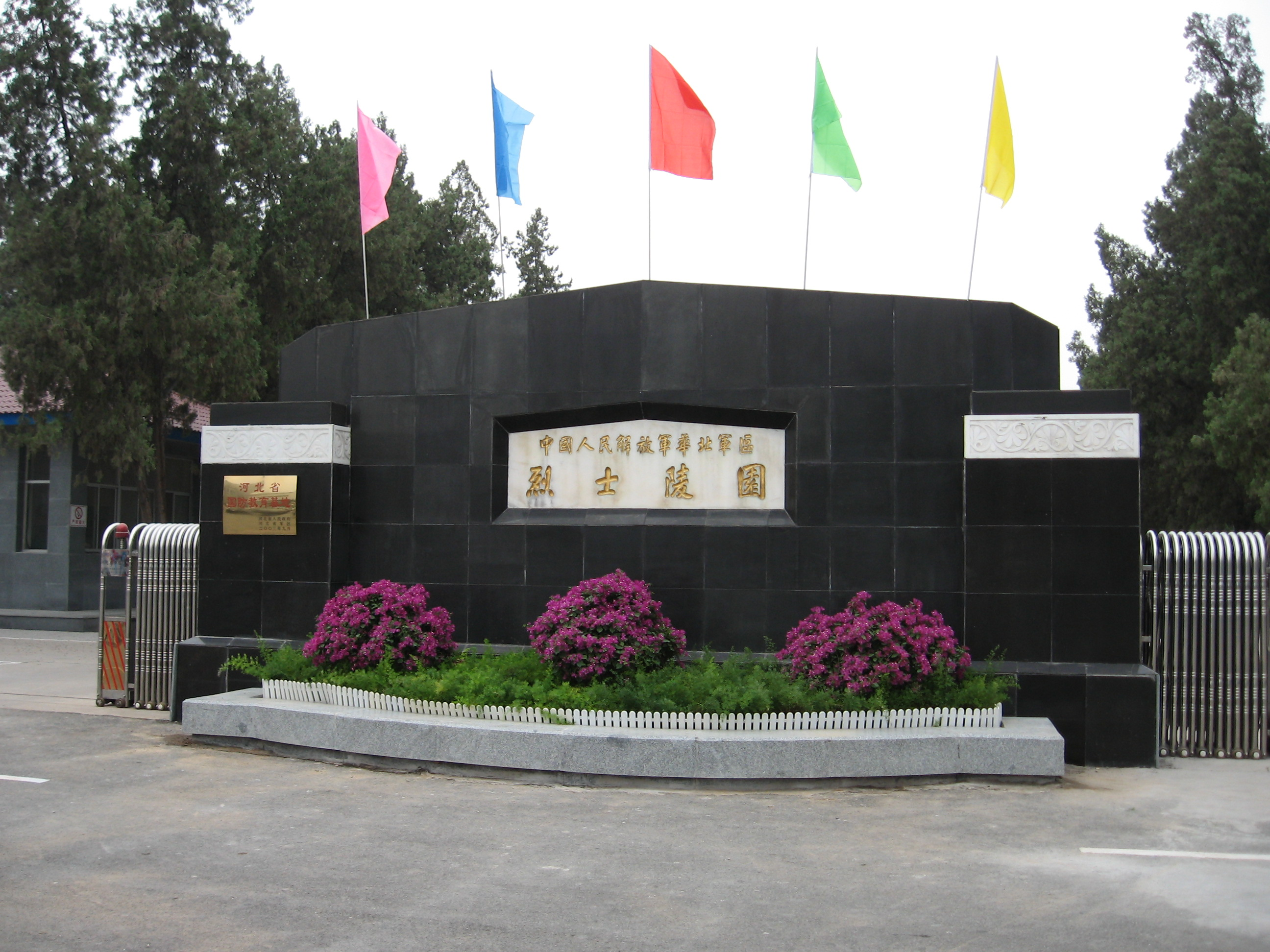 中国河北石家庄华北军区烈士陵园大门。